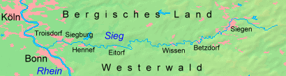 Verlauf des Flusses Sieg. Demis Mapserver. Bearbeitet von Marcus Bentfeld (Benutzer Bent). Gemeinfrei.